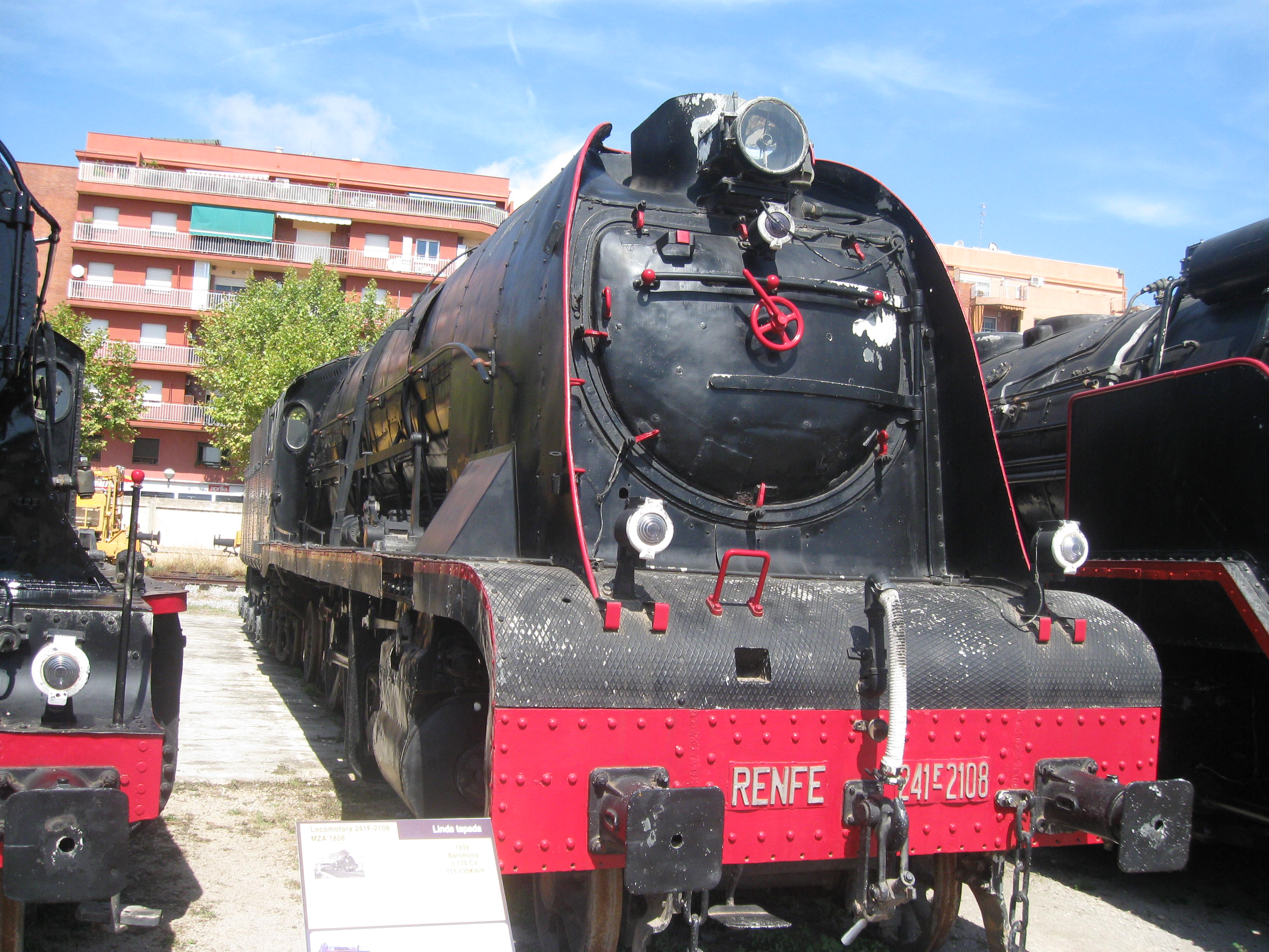 Locomotora MZA 1808, renumerada en RENFE con el número 241F-2108. Coloquialmente llamada Bonita.